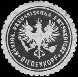 Siegelmarke Königlich-Preussisches Amtsgericht Biedenkopf; um 1900